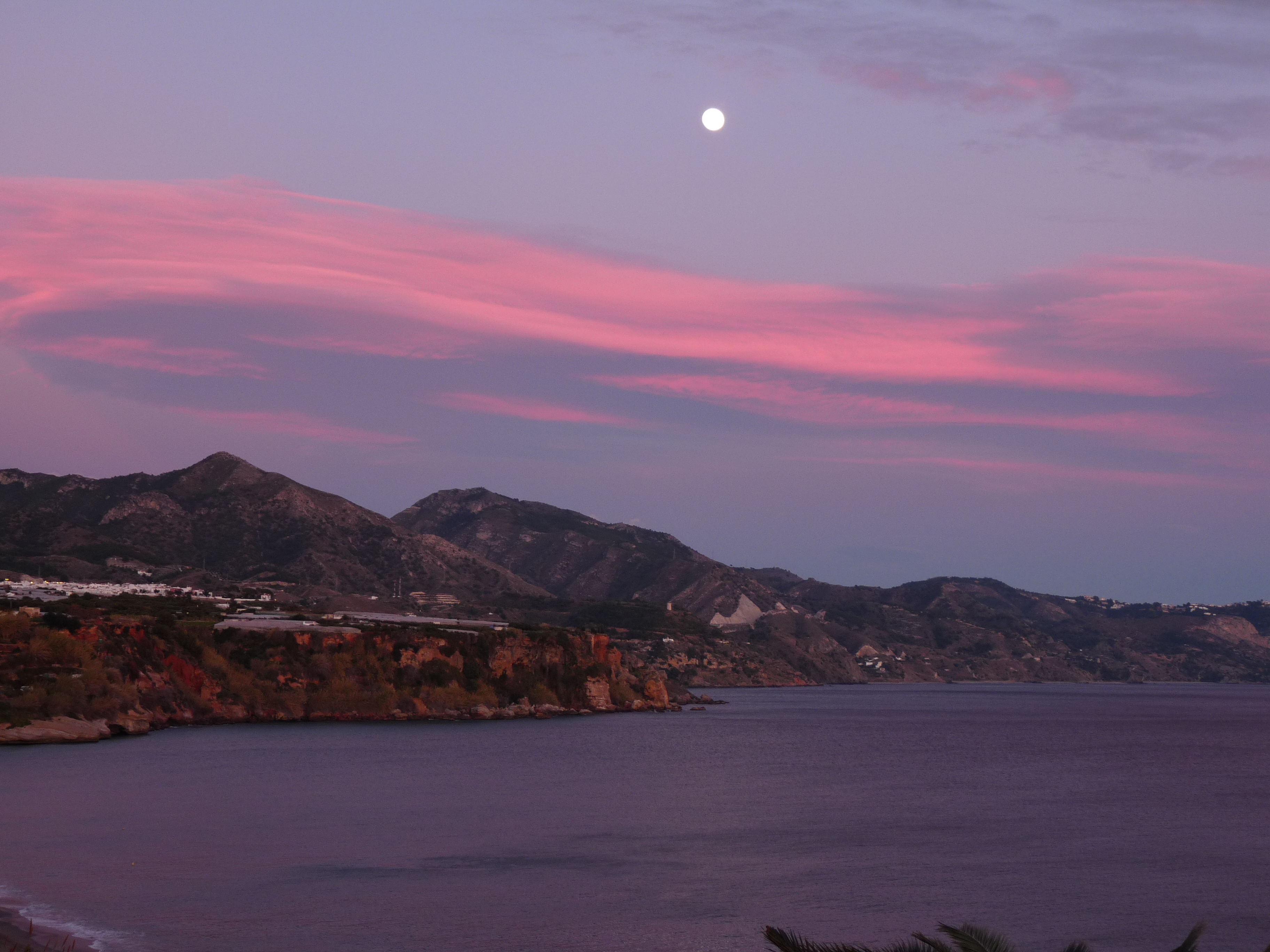 Nerja Sun and Moon